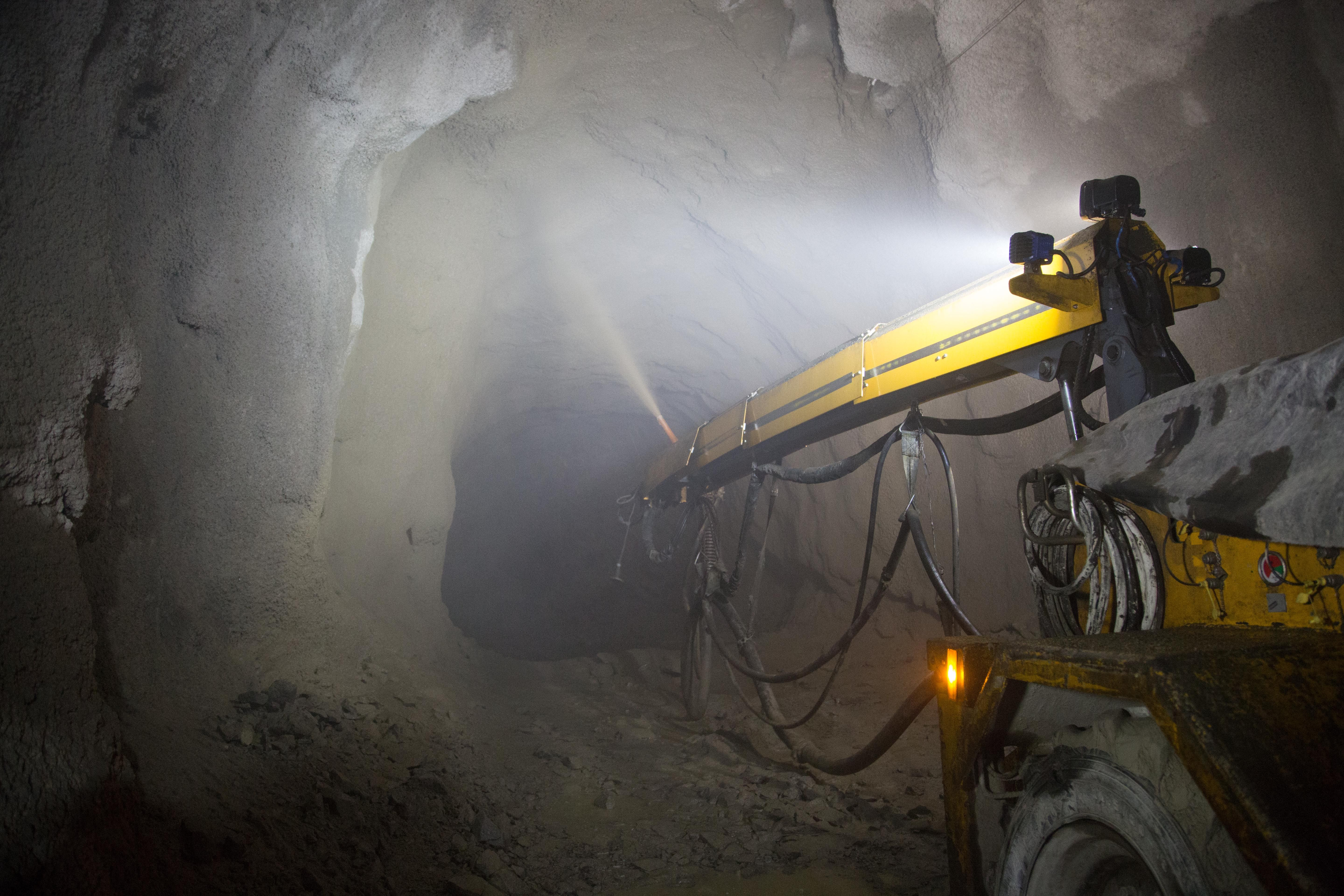 Putzmeister Tunnelspritzmaschine SPM 4210 in der Mine Rasvumchorr in Russland